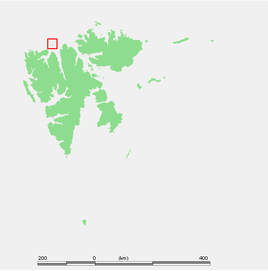 Svalbard Islands - Russia - Spitsbergen - Moffen.PNG